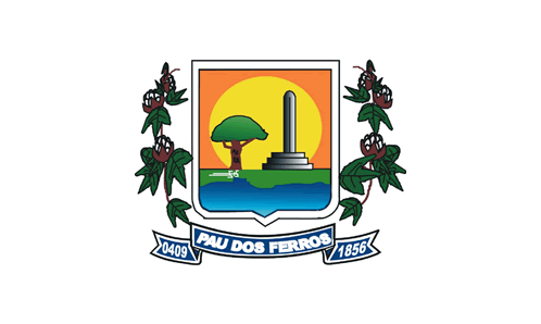 Bandeira de Pau dos Ferros, estado do Rio Grande do Norte, Brasil.